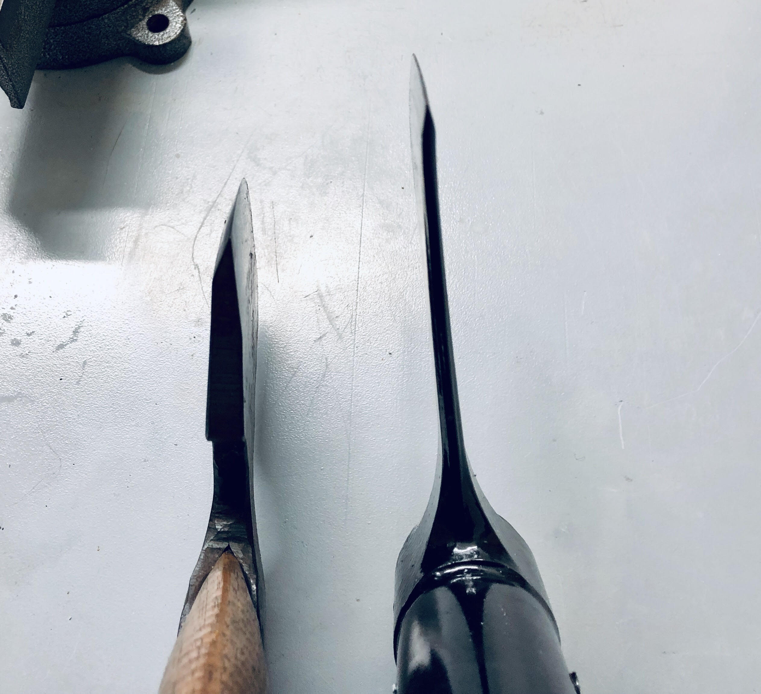 גרזן עבודה וגרזן קרב